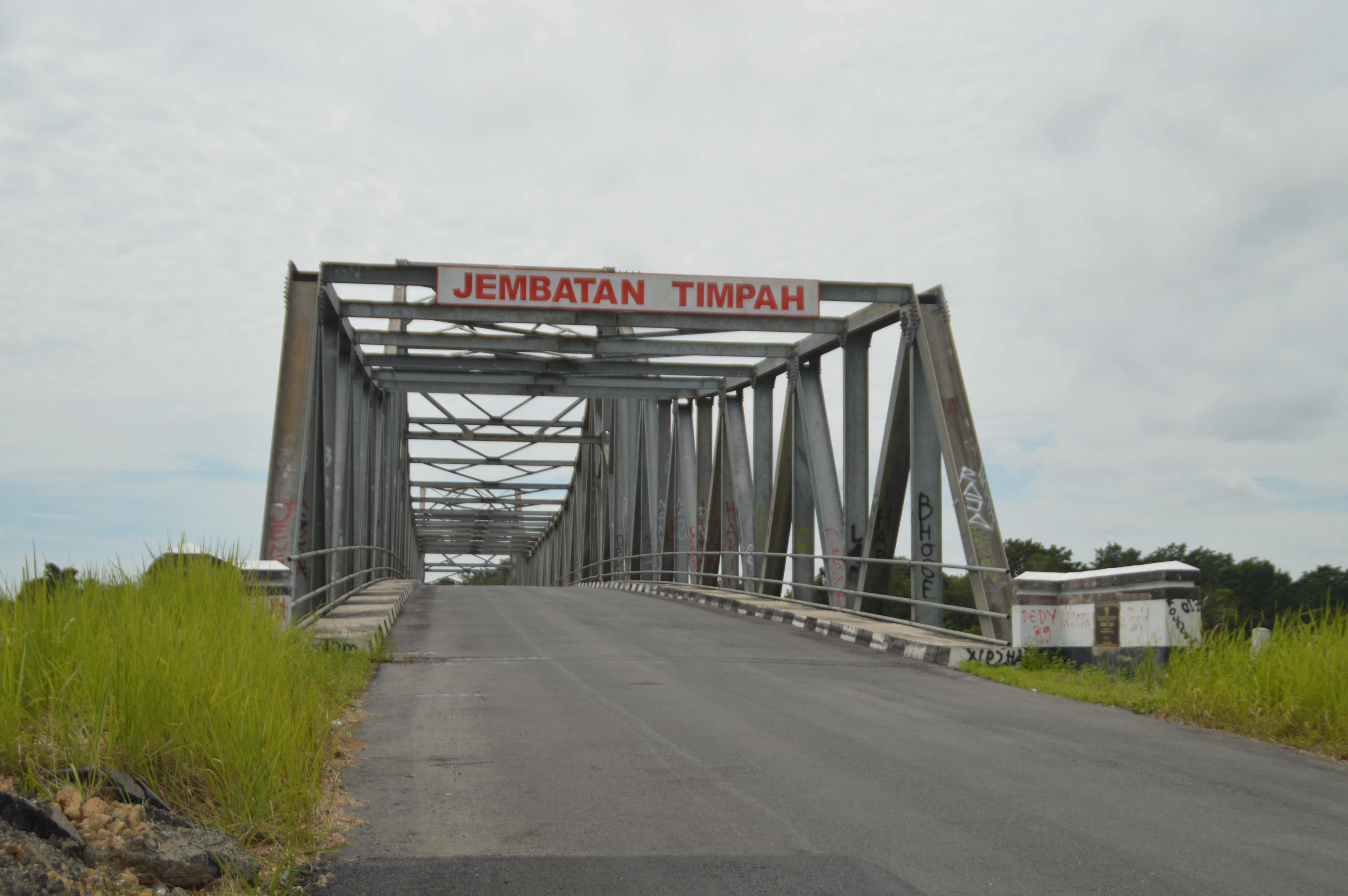 Jembatan Timpah yang menjadi bagian dari jalan poros Palangka Raya-Buntok, Kalimantan Tengah.